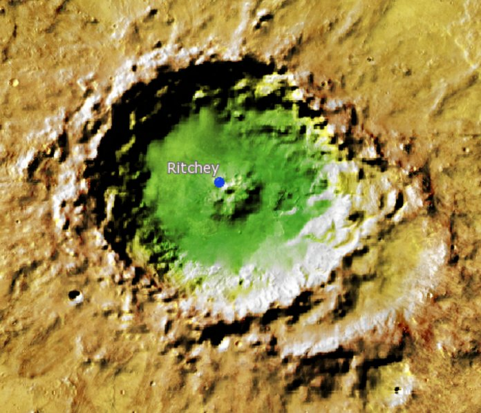 Cráter marciano Ritchey. (Imagen IAU/USGS/Goddard/A SU/USGS)